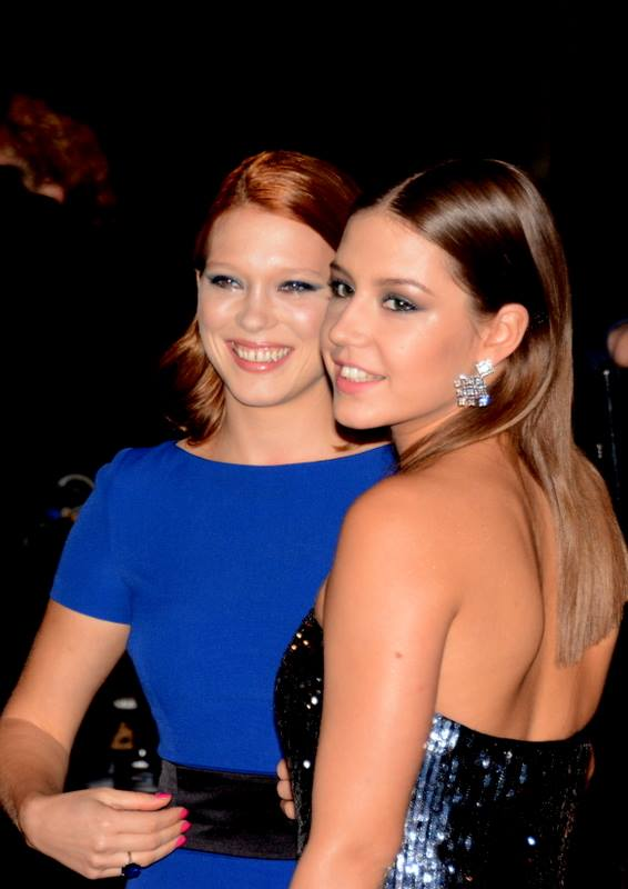 Léa Seydoux et Adèle Exarchopoulos à la cérémonie des César